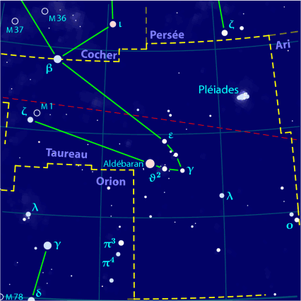 Carte pour la constellation Taureau Produite à l'aide du logiciel PP3